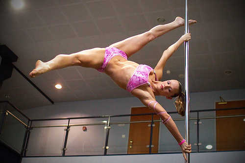 flag pole